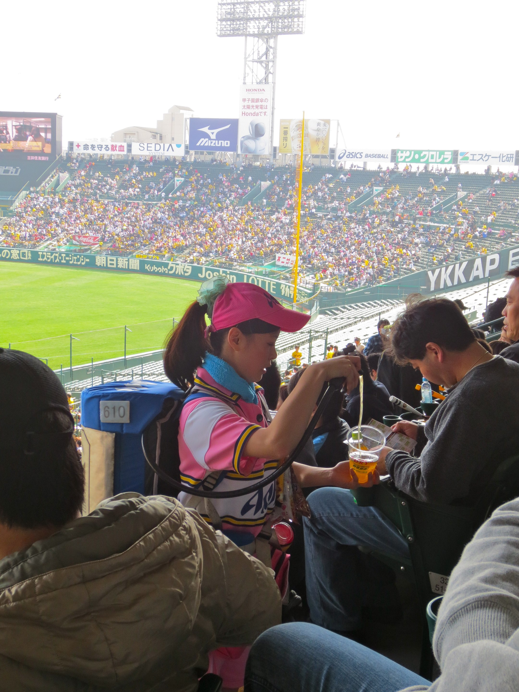 Hanshin_Tigers_4